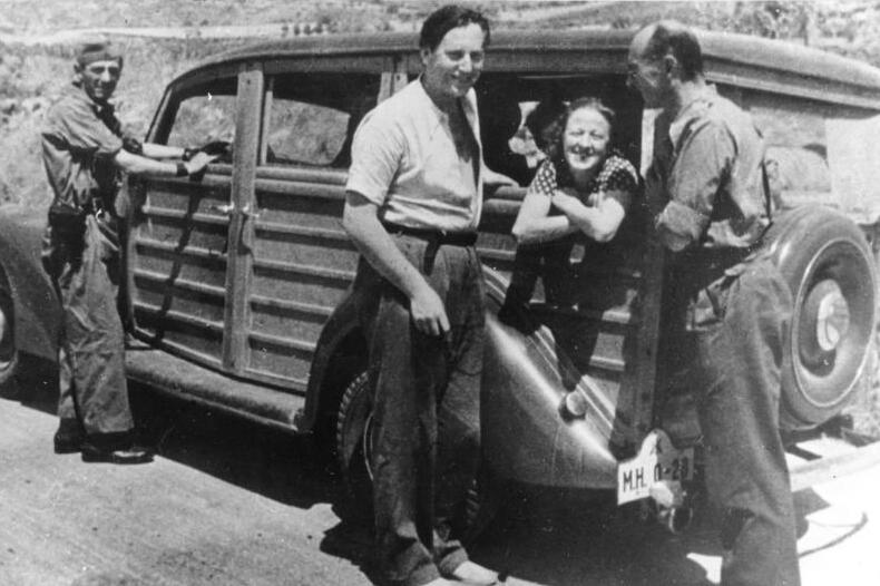 ADN-ZB/Archiv Nationalrevolutionärer Krieg des spanischen Volkes vom 18.7.1936 bis 2.4.1939/ Internationale Brigaden Der Schriftsteller Ludwig Renn, Chef des Stabes der XI. Internationalen Brigade im spanischen Freiheitskampf, Kommandeur des Thälmann-Bataillons 1936/37 (rechts) mit dem norwegischen Dichter Nordahl Grieg (Mitte) der 1937 in Spanien kämpfte.